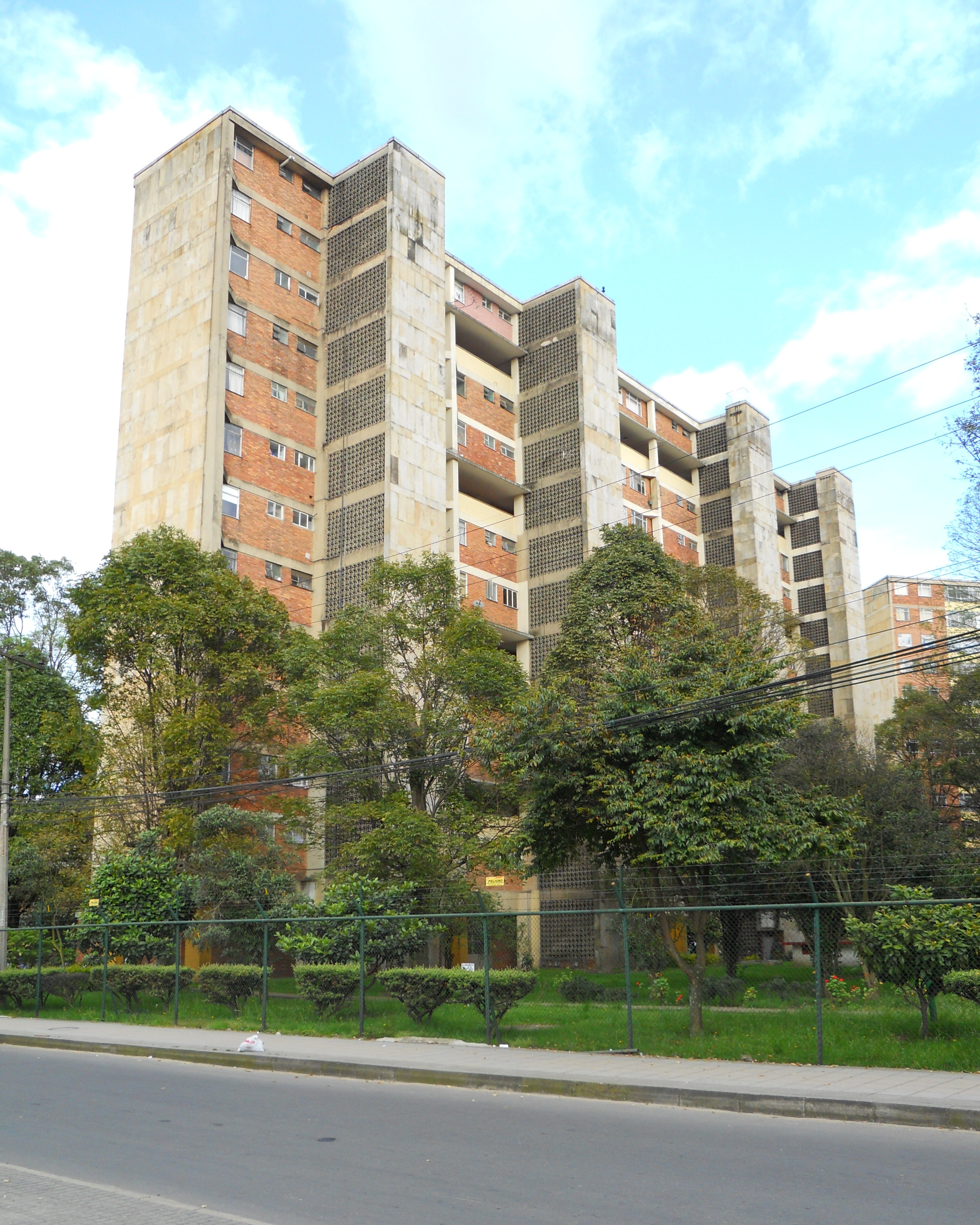 Edificios del Centro Antonio Nariño.